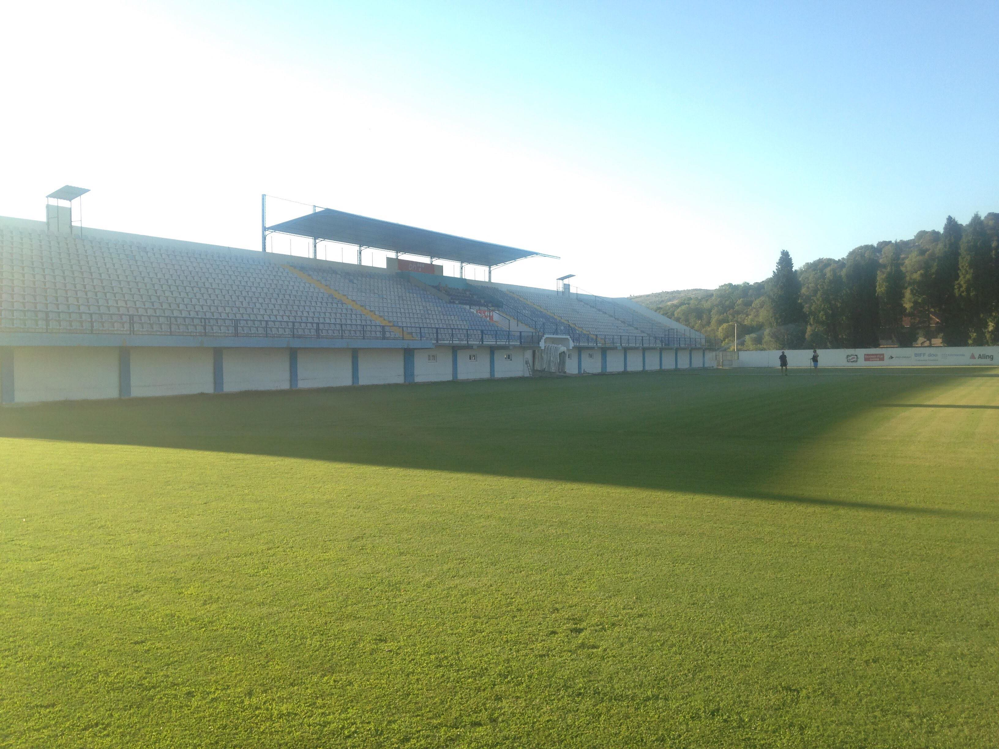 Stadion Perica-Pero Pavlović